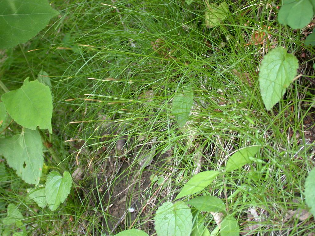 Carex fernaldiana：イトスゲ 2005/06/04 和歌山県高野山：Kouyasan:Wakayama Pref.